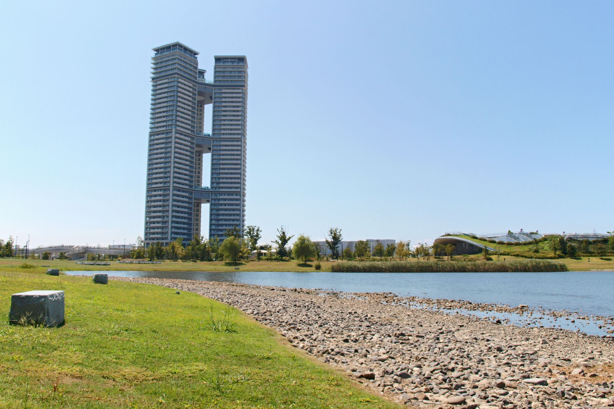 福岡市東区の人工島「アイランドシティ」にあるアイランドシティ中央公園